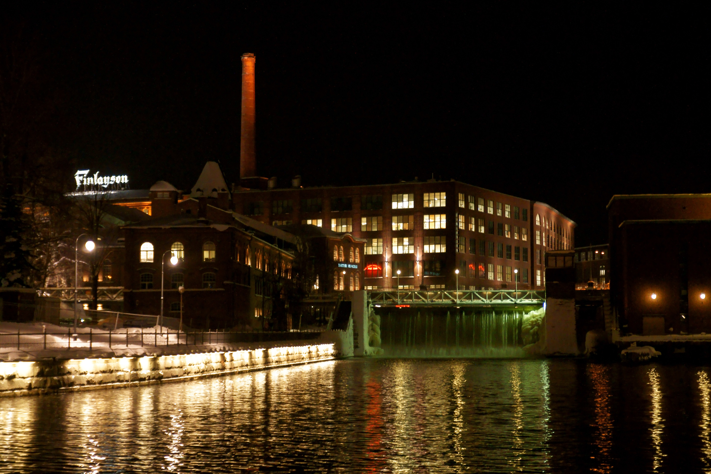 Tammerkoskea ja Finlaysonin tehdasrakennuksia Tampereella.